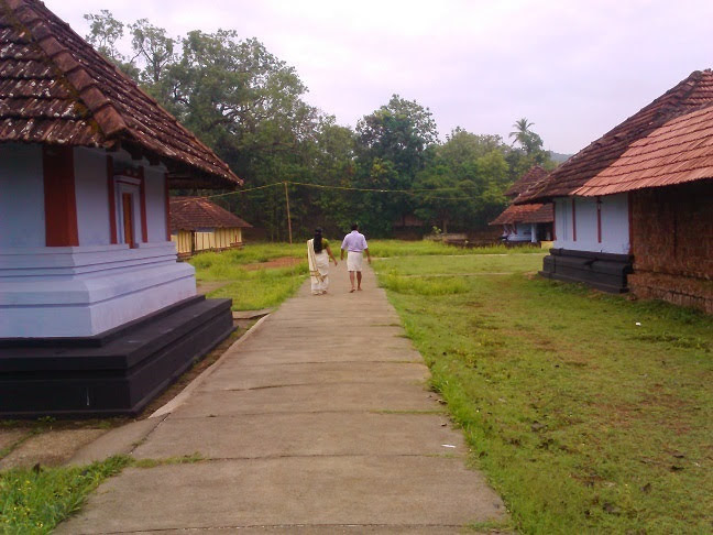 തൃത്താലയിലെ ഈ പന്നിയൂർ വരാഹമൂർത്തീ ക്ഷേത്രം പെരുംതച്ചൻ അവസാനമായി പണിത അമ്പലം ആണെന്നും അദ്ദേഹം ഉപയോഗിച്ച ഒരു കല്ലുളി വച്ചുകൊണ്ടു അവിടെ സ്ഥാനം തികച്ചതിന്റെ അടയാളം ഇപ്പോഴും അവിടെ കാണാം എന്നും ചരിത്രകാരന്മാർ പറയുന്നുണ്ട്